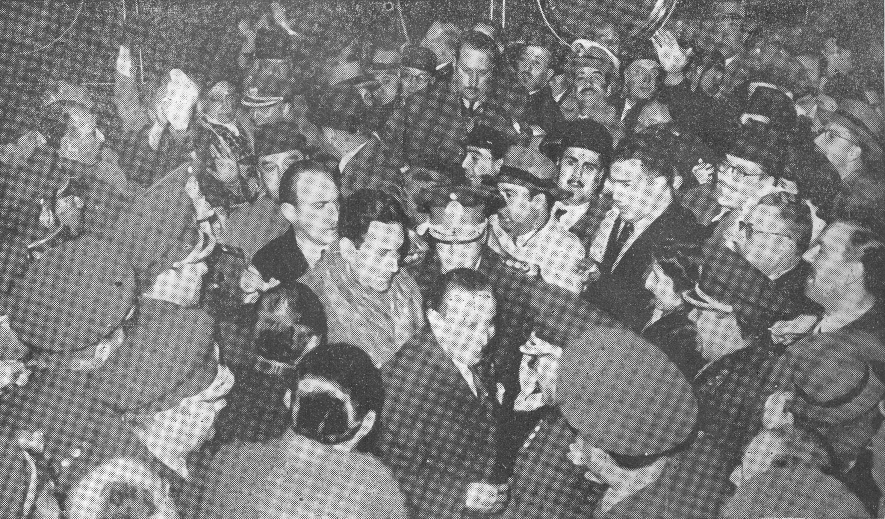 Revista Judicial nº176: "Autoridades y pueblo de Tucumán dieron un caluroso recibimiento a los dos presidentes".